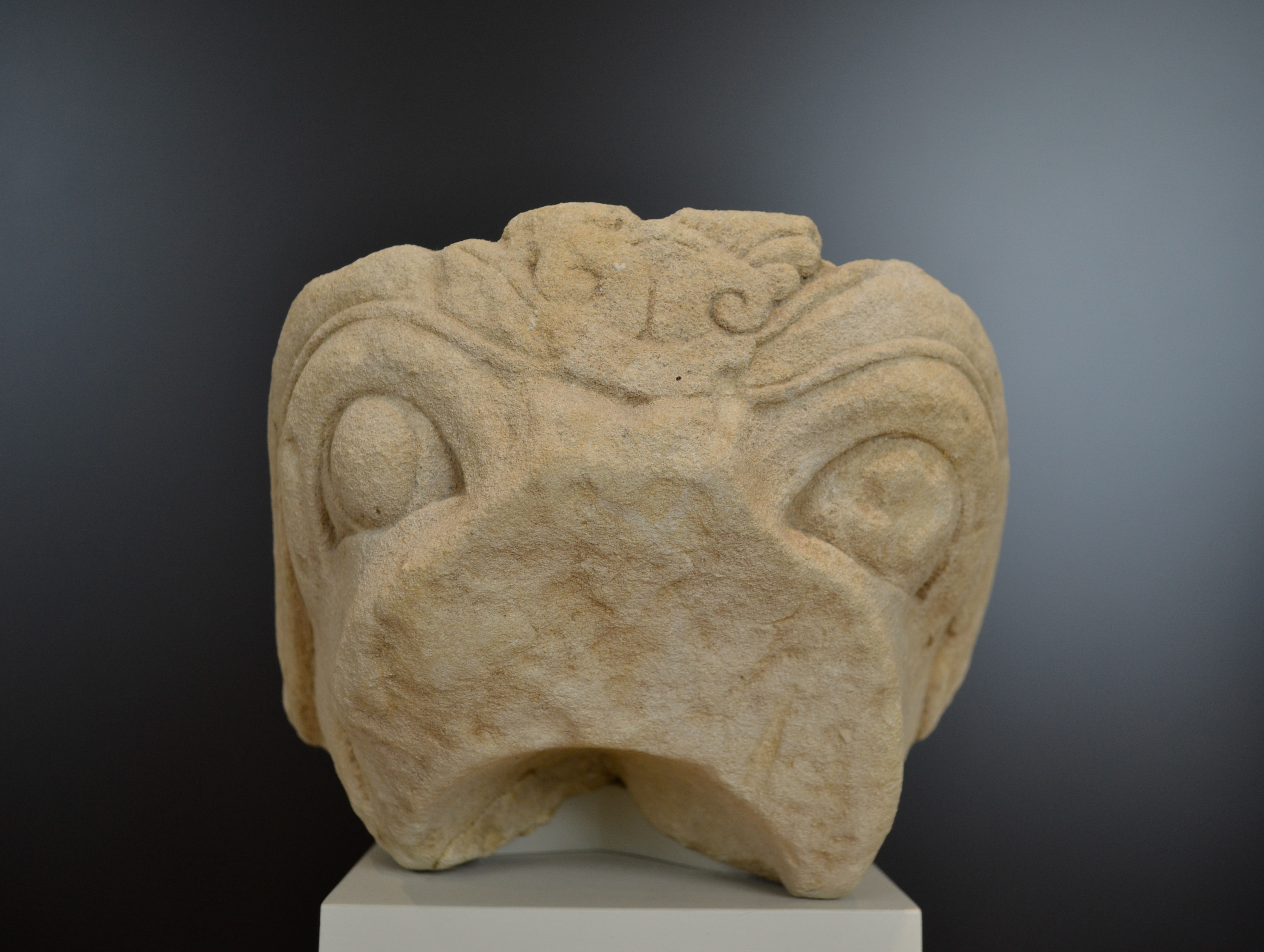 Cabeza de grifo procedente de Redován (Alicante). Escultura ibera de bulto redondo de piedra caliza. Estilísticamente presenta influencias arcaicas griegas. De significado principalmente maléfico, asociado a contextos funerarios, se define como protector de tumbas. Mediados del siglo VI a. C. - mediados del siglo V a. C. Altura: 18,50 cm; anchura: 27 cm; grosor: 19 cm. Nº Inv. 38437. Museo Arqueológico Nacional de España.